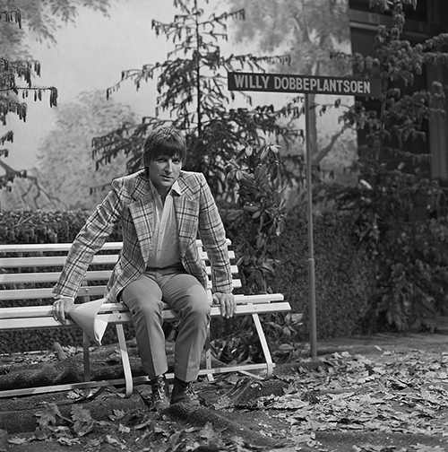 Wim T. Schippers in het Willy Dobbeplantsoen. Een werkopname uit de Nederlandse televisieserie De lachende scheerkwast in 1981